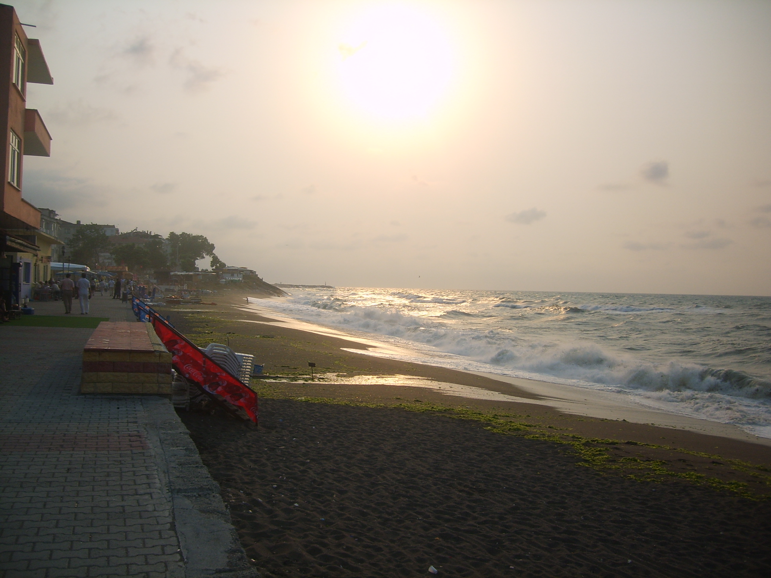 Akçakoca'nın her mevsimi çok güzeldir. Karadeniz'in genel özelliklerinden biri de yaz mevsiminin kısa sürmesidir. 1 Eylül'de Akçakoca'da çektiğim kıyı resmi.